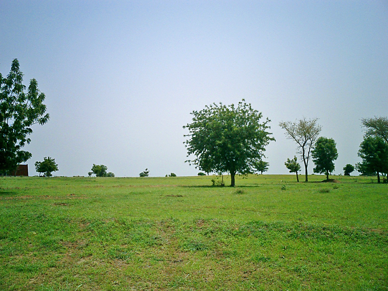 Burkina Faso: Vegetation in Dourtenga zur Regenzeit